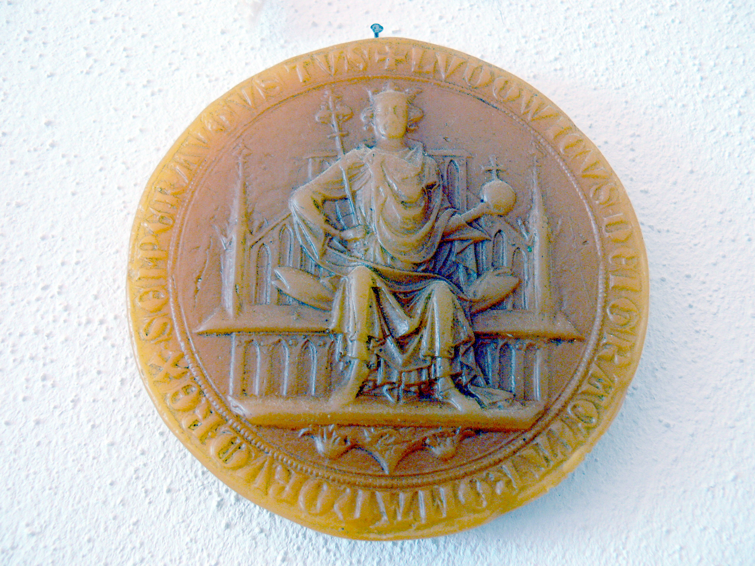 Siegel Ludwigs IV. als deutscher König 1314.